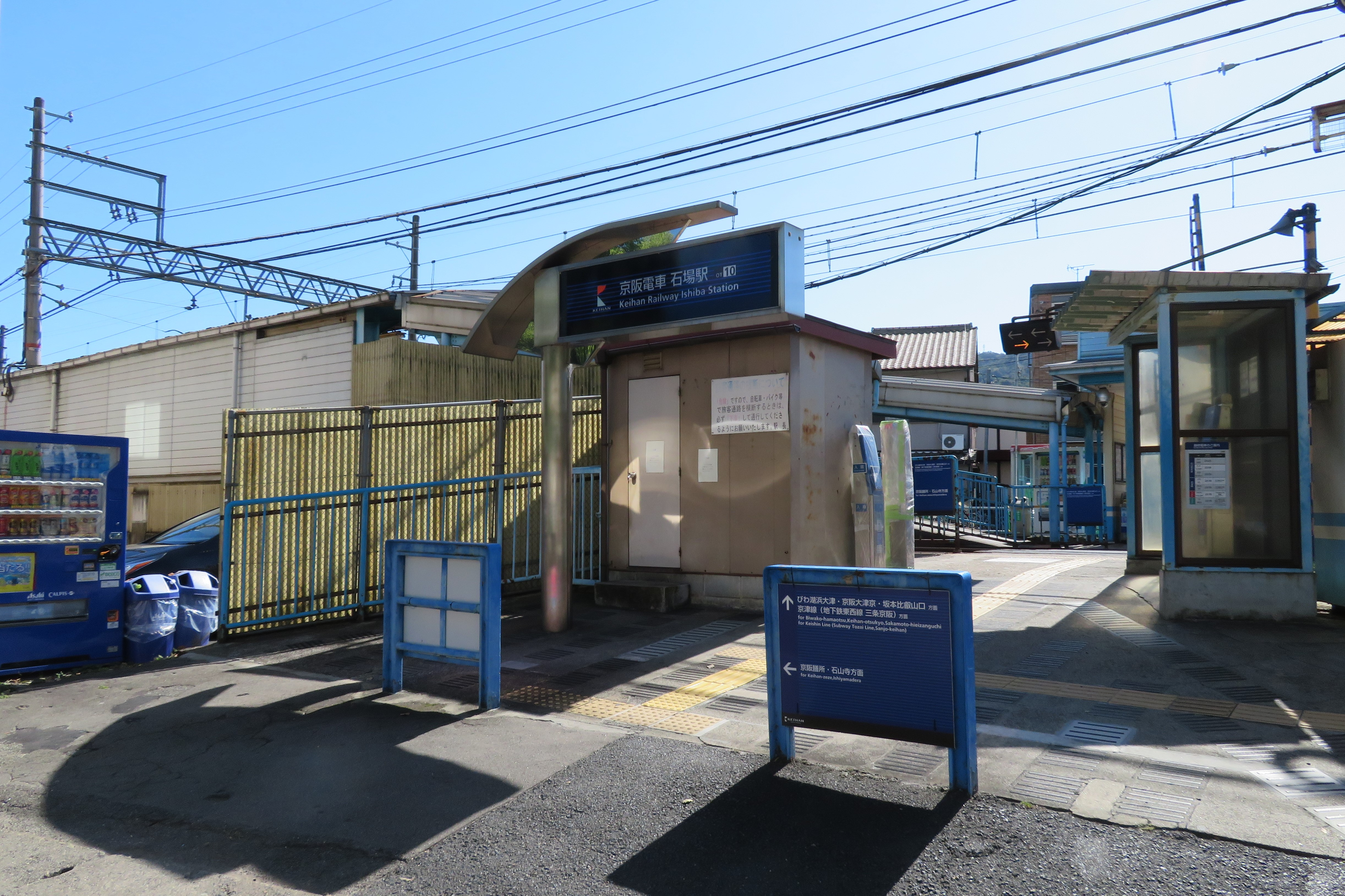 京阪電鉄石場駅